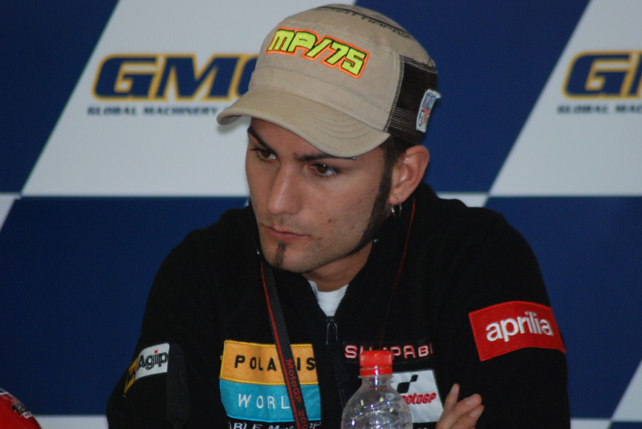 Mattia Pasini, Post qualifying press conference.